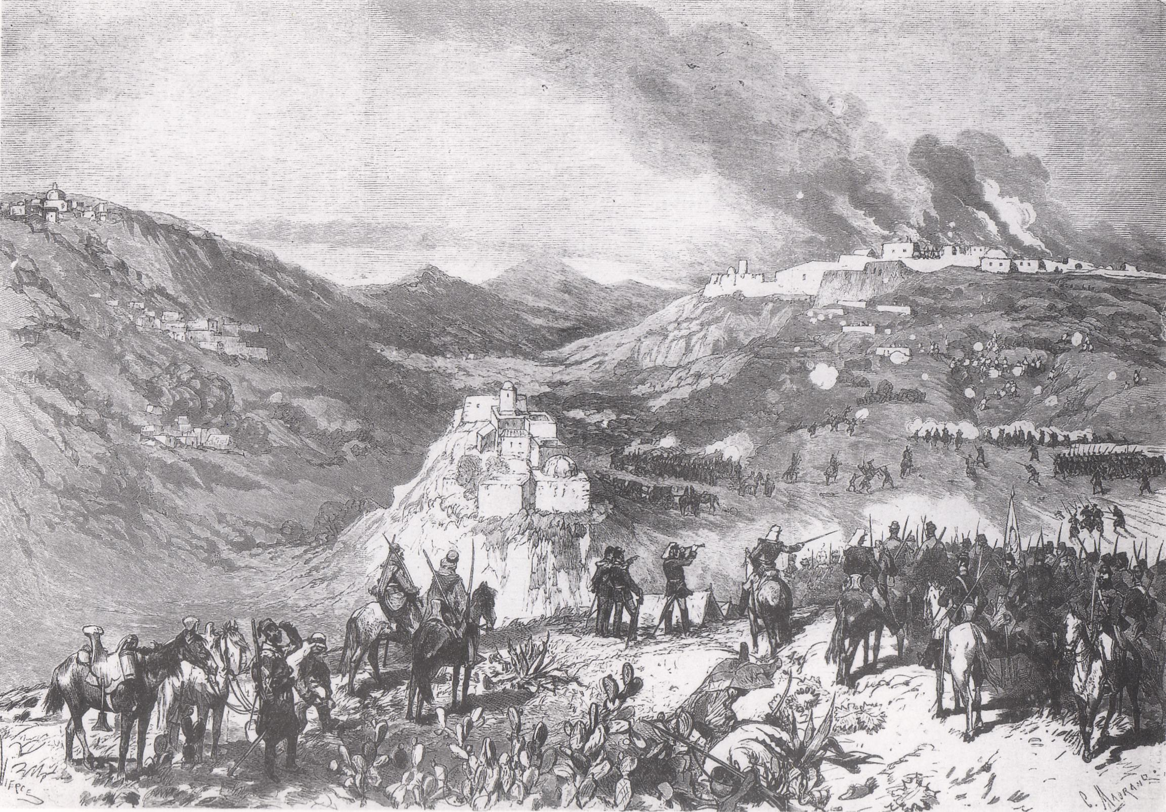 Combat de Tizi-Ouzou (Algérie), lors de l'insurrection de Mokrani en 1871.